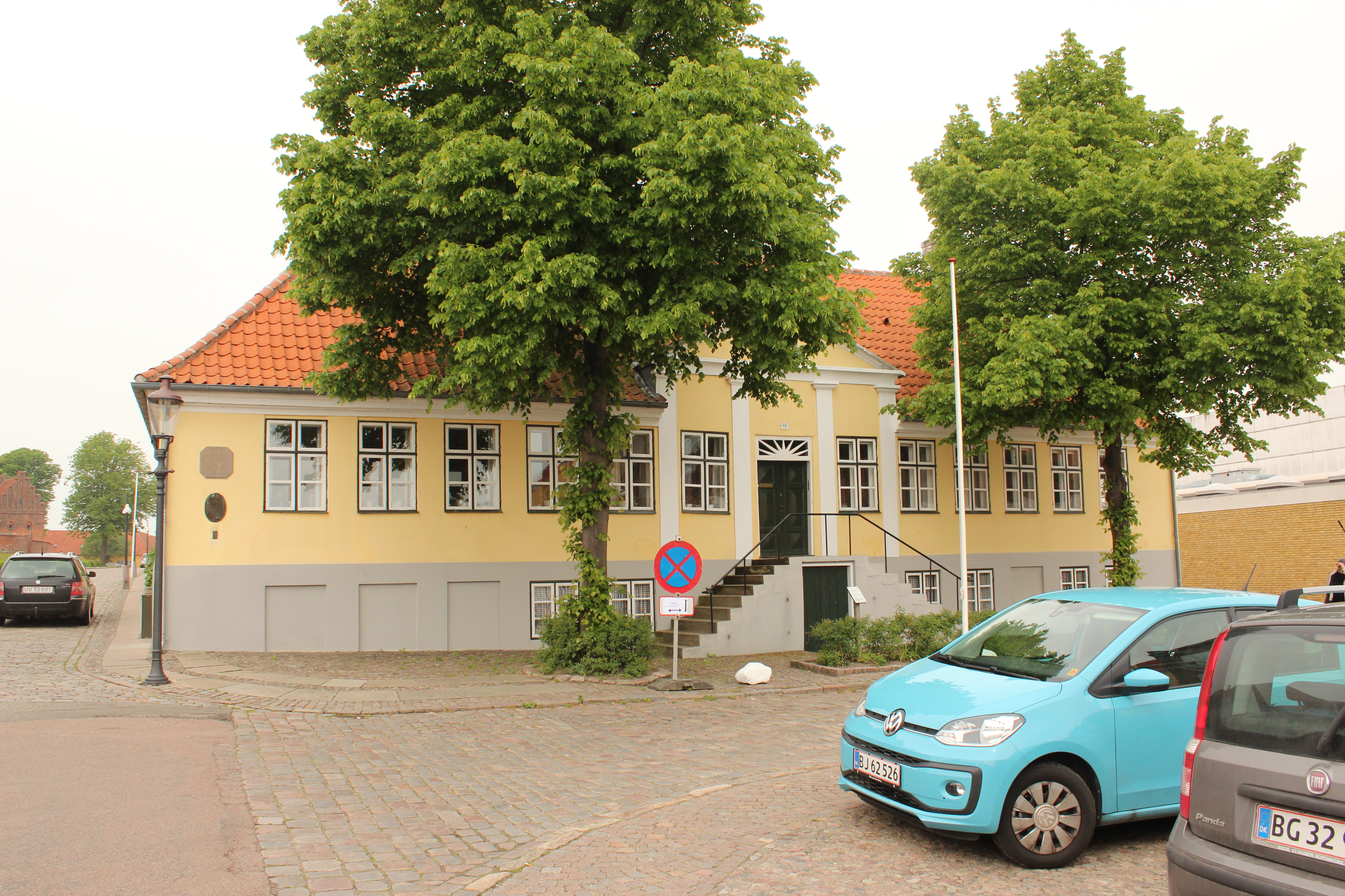 Sigrid Undsets barndomshjem på det gamle torv i Kalundborg